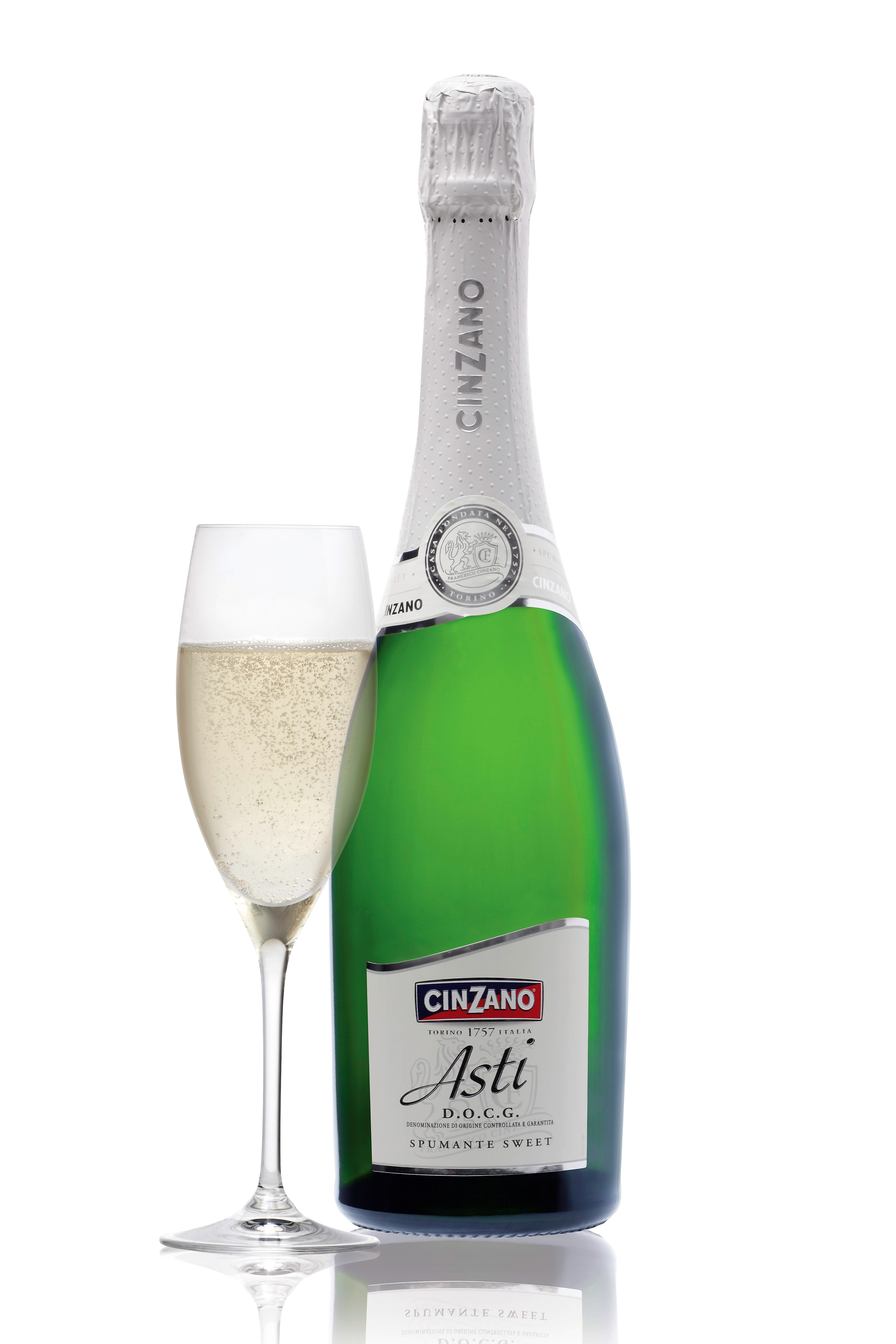 Asti Spumante von Cinzano (Gruppo Campari).